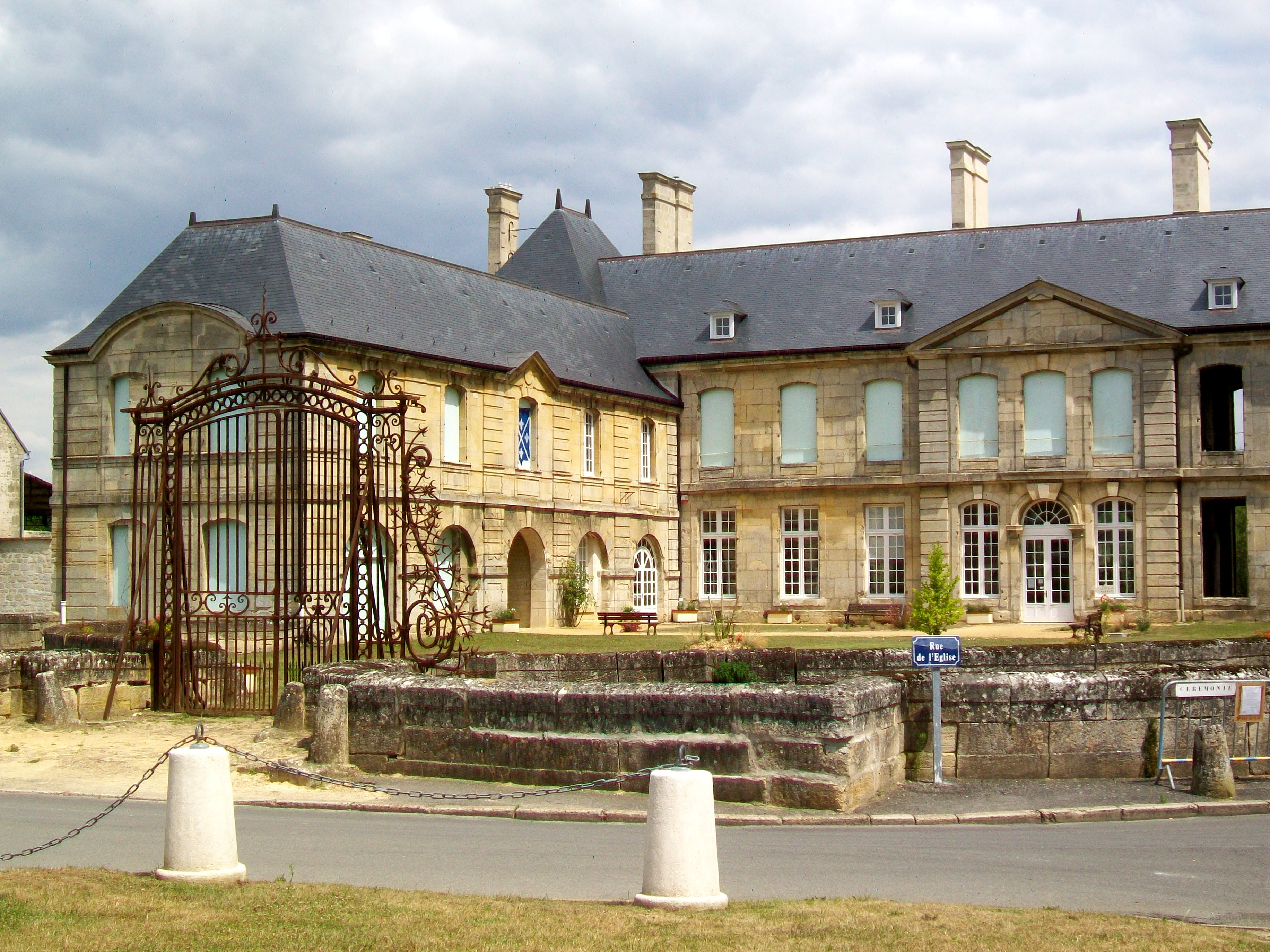 Le château de Villers-sous-Saint-Leu, en centre-ville, rue de l'Église. Le château a été ruiné dans les années 1980 et est toujours en train de réhabilitation par la mairie, qui a pris son domicile dans l'aile gauche.